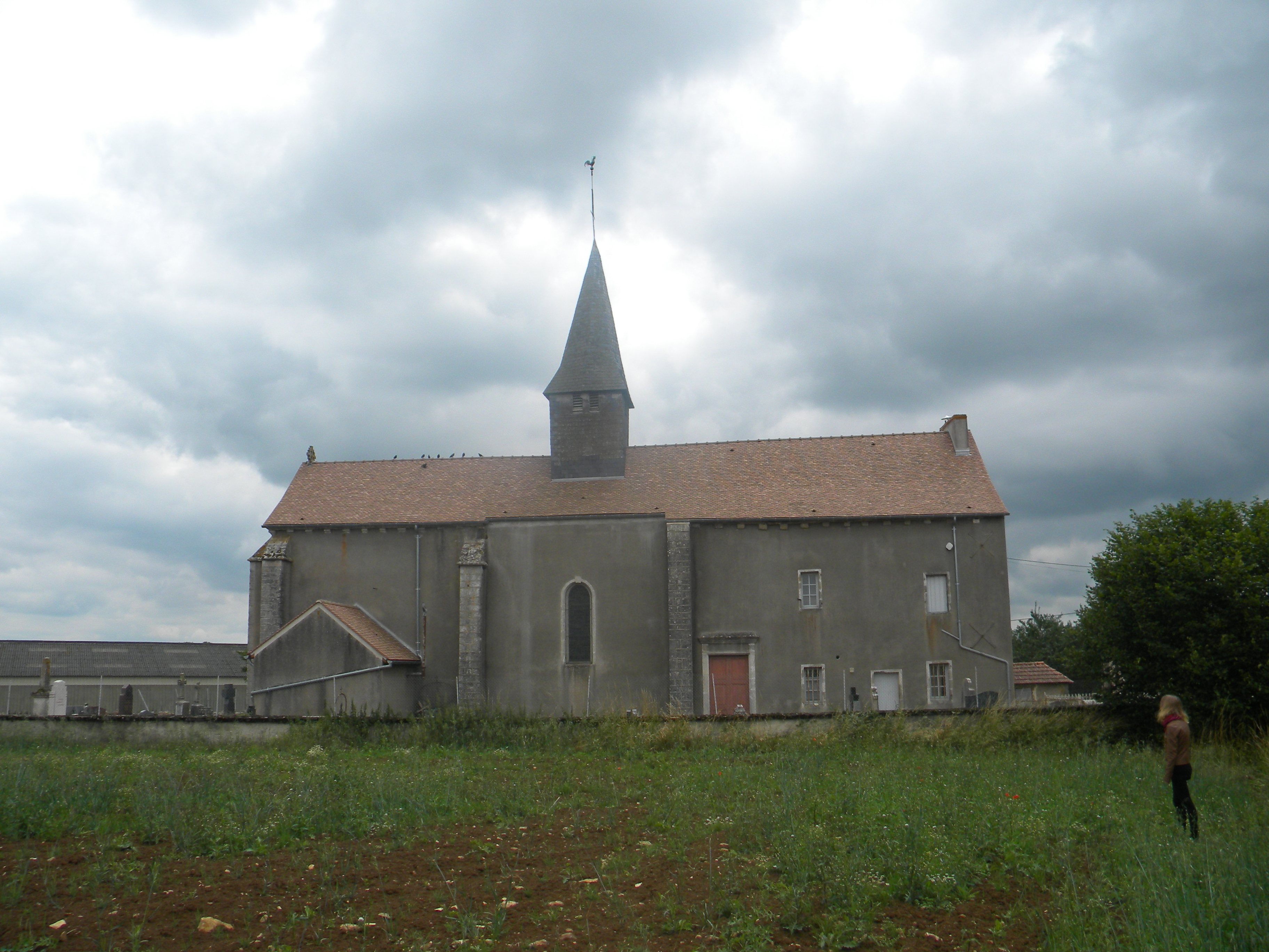 Paroĥestrejo-preĝejo de Thomirey